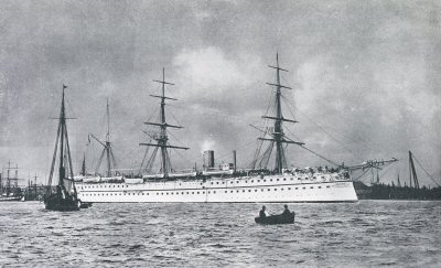 Original caption: “HMS Malabar”